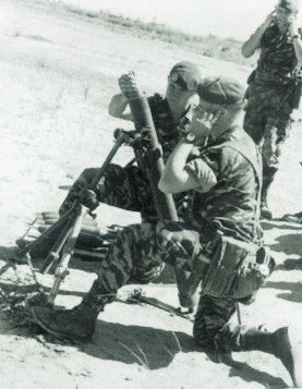 Mortier de mortier 81 mm LC en action lors de l'assaut de la ville de Kolwezi